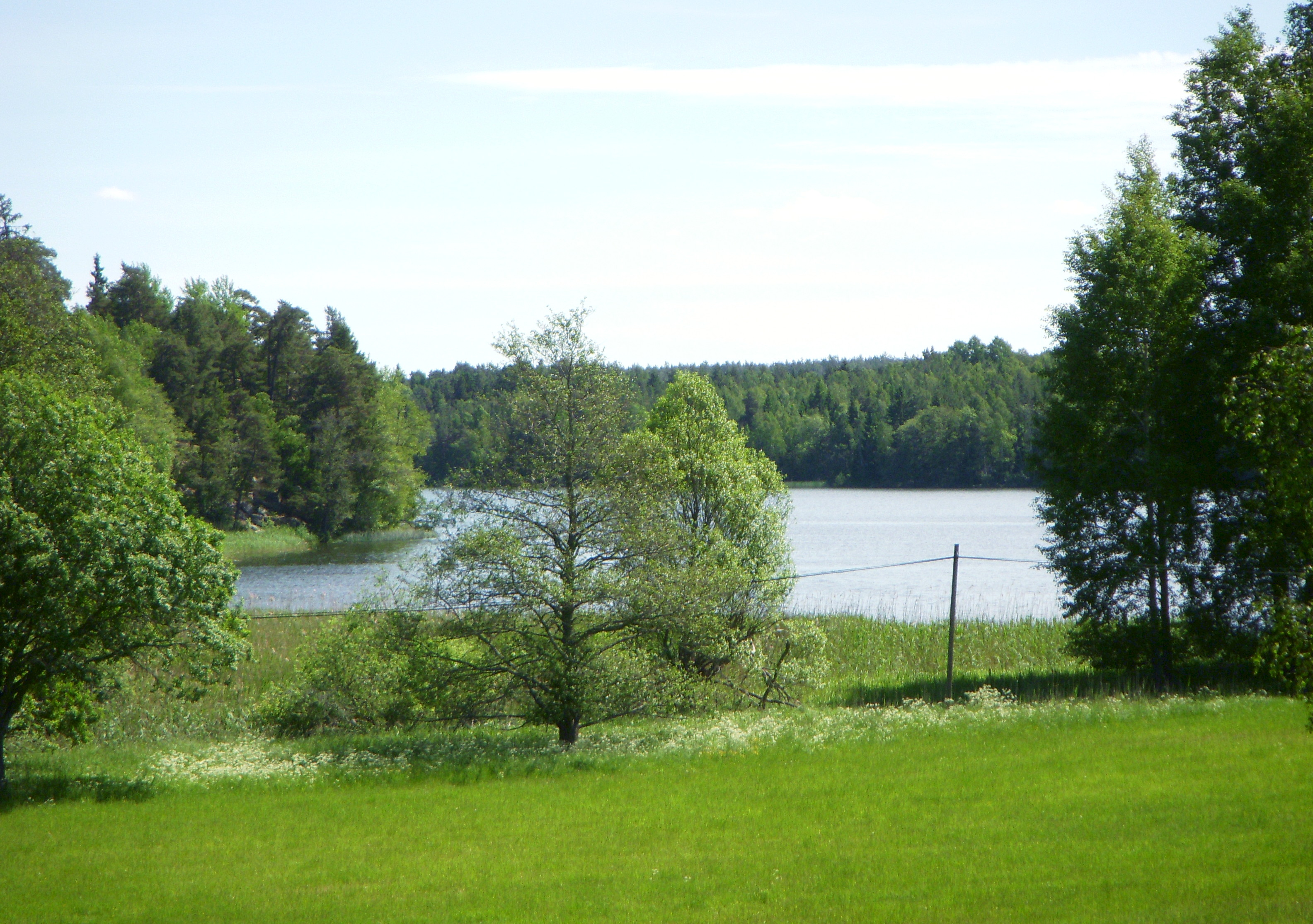 Oxundasjön från Upplandsleden